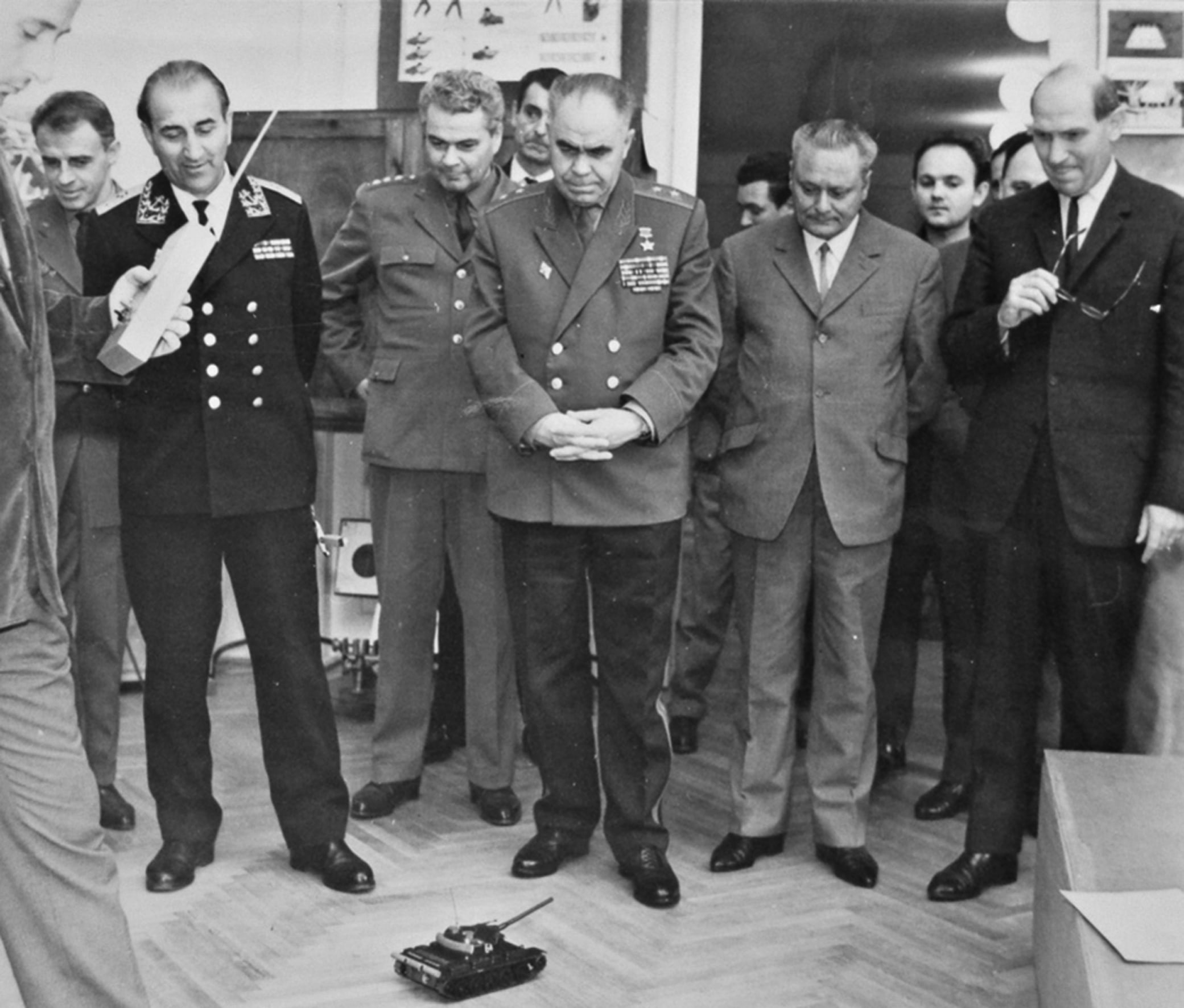 Cəlil Cavadov